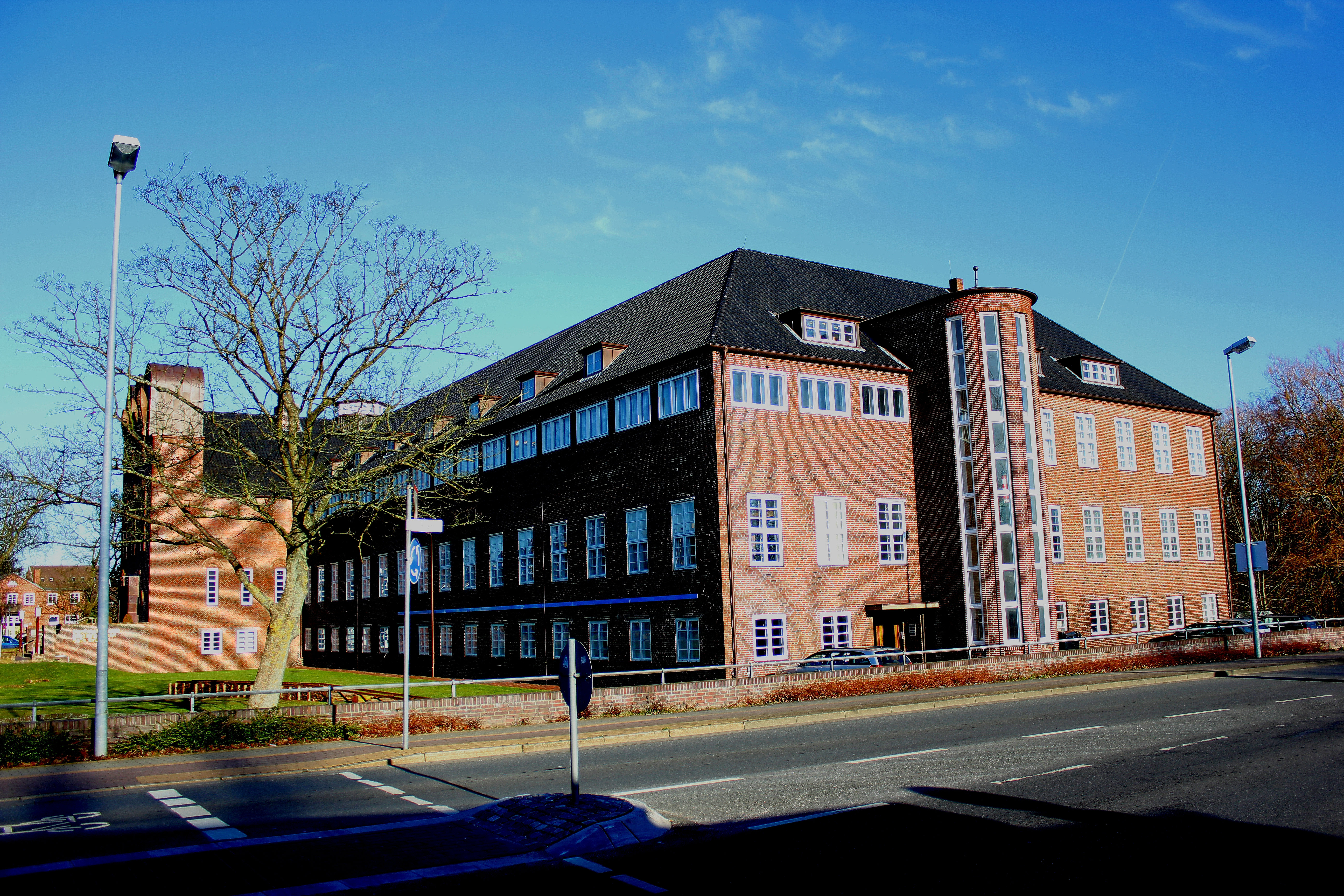 Ludwig-Nissen-Haus (2012)